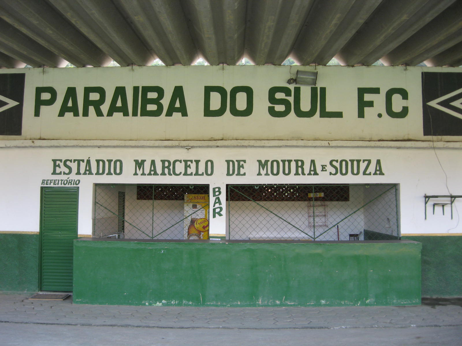 Estádio Marcelo de Moura e Souza, localizado em Paraíba do Sul, no estado do Rio de Janeiro, Brasil.